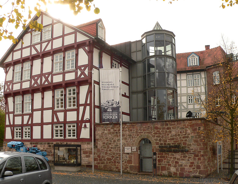 Hessisches Braunkohle Bergbaumuseum Borken